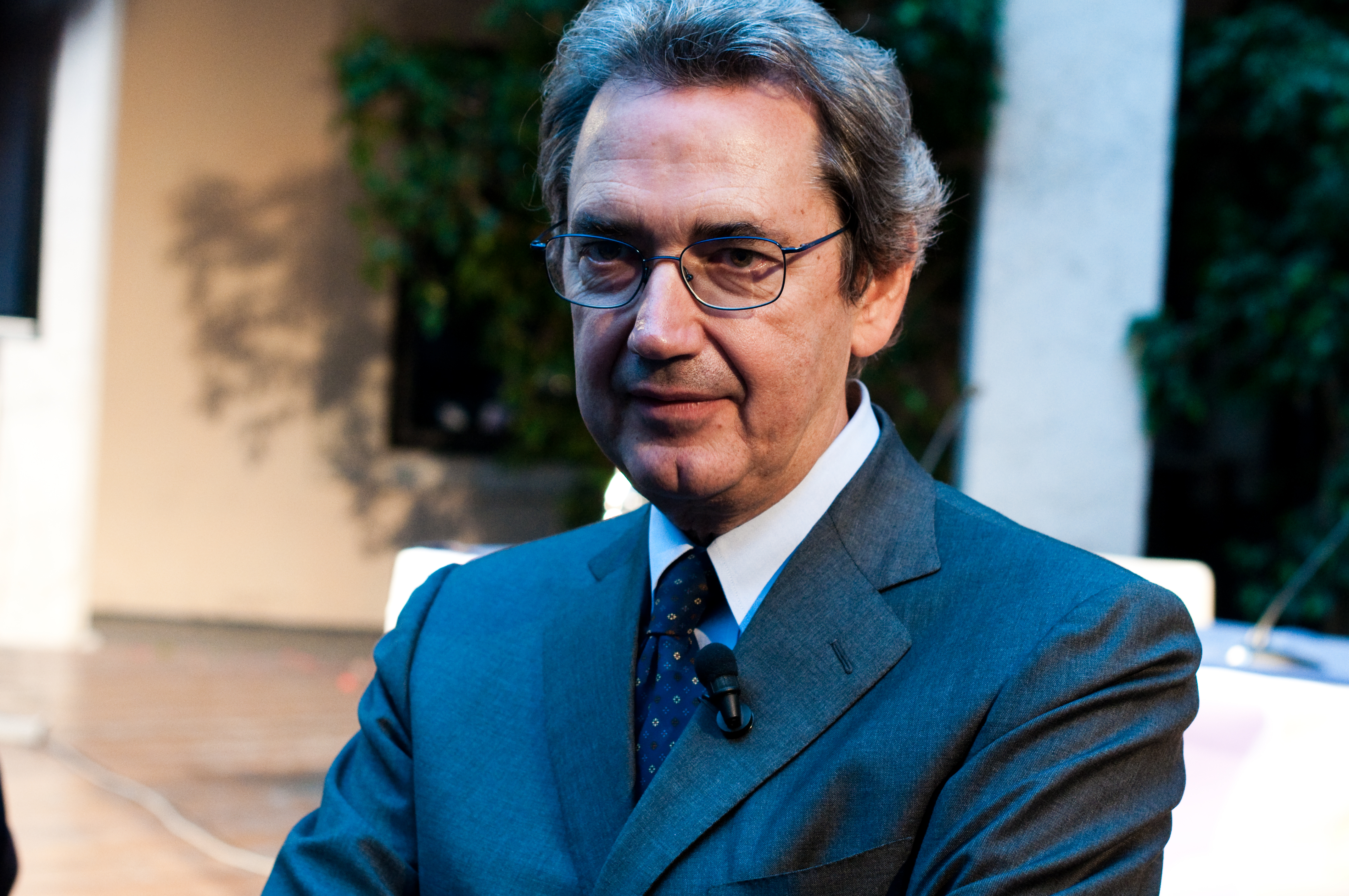 Franco Bernabè al Blogfest 2009 a Riva del Garda